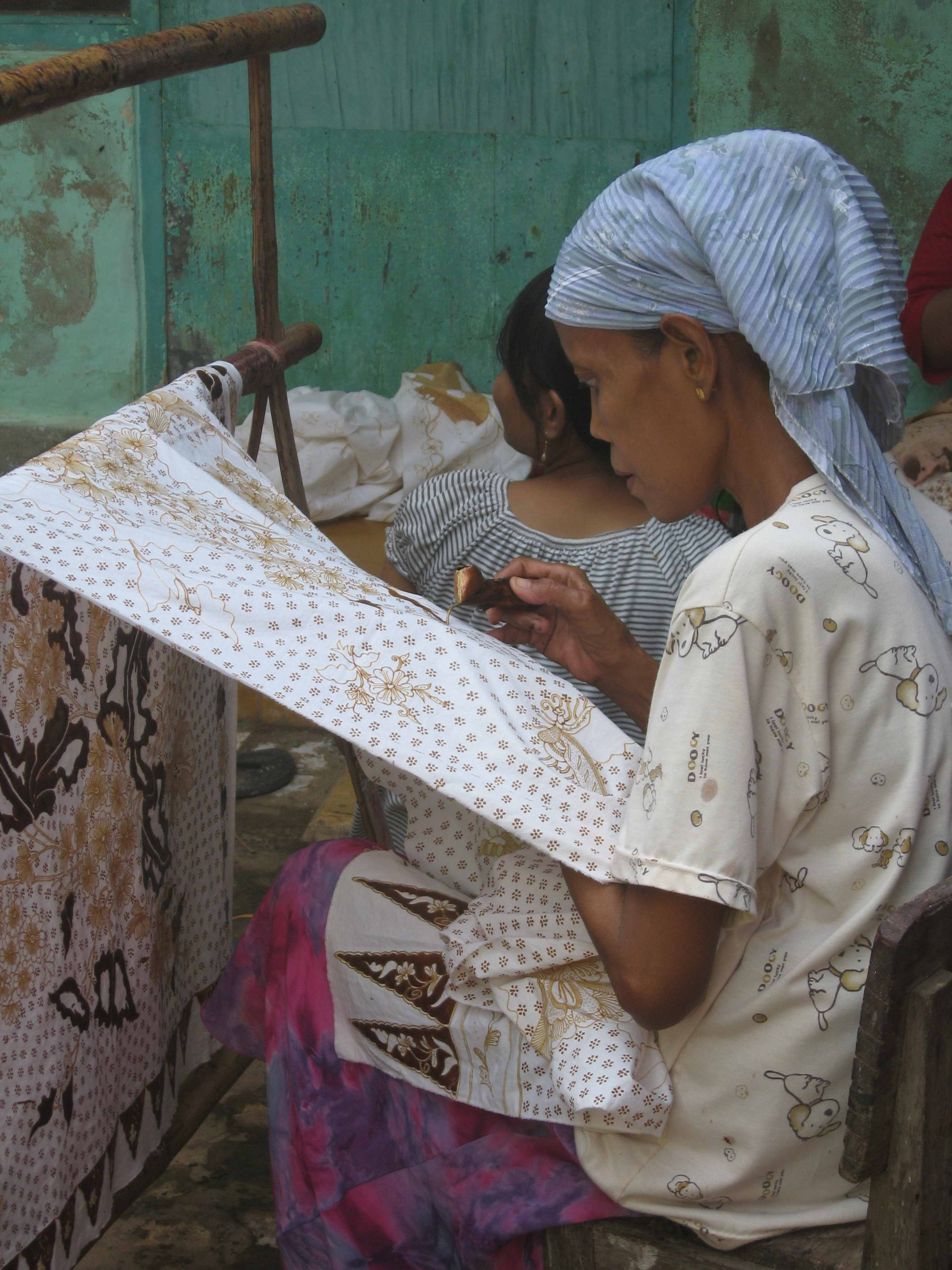 pembatik di desa Tanjungbumi, Bangkalan, Madura